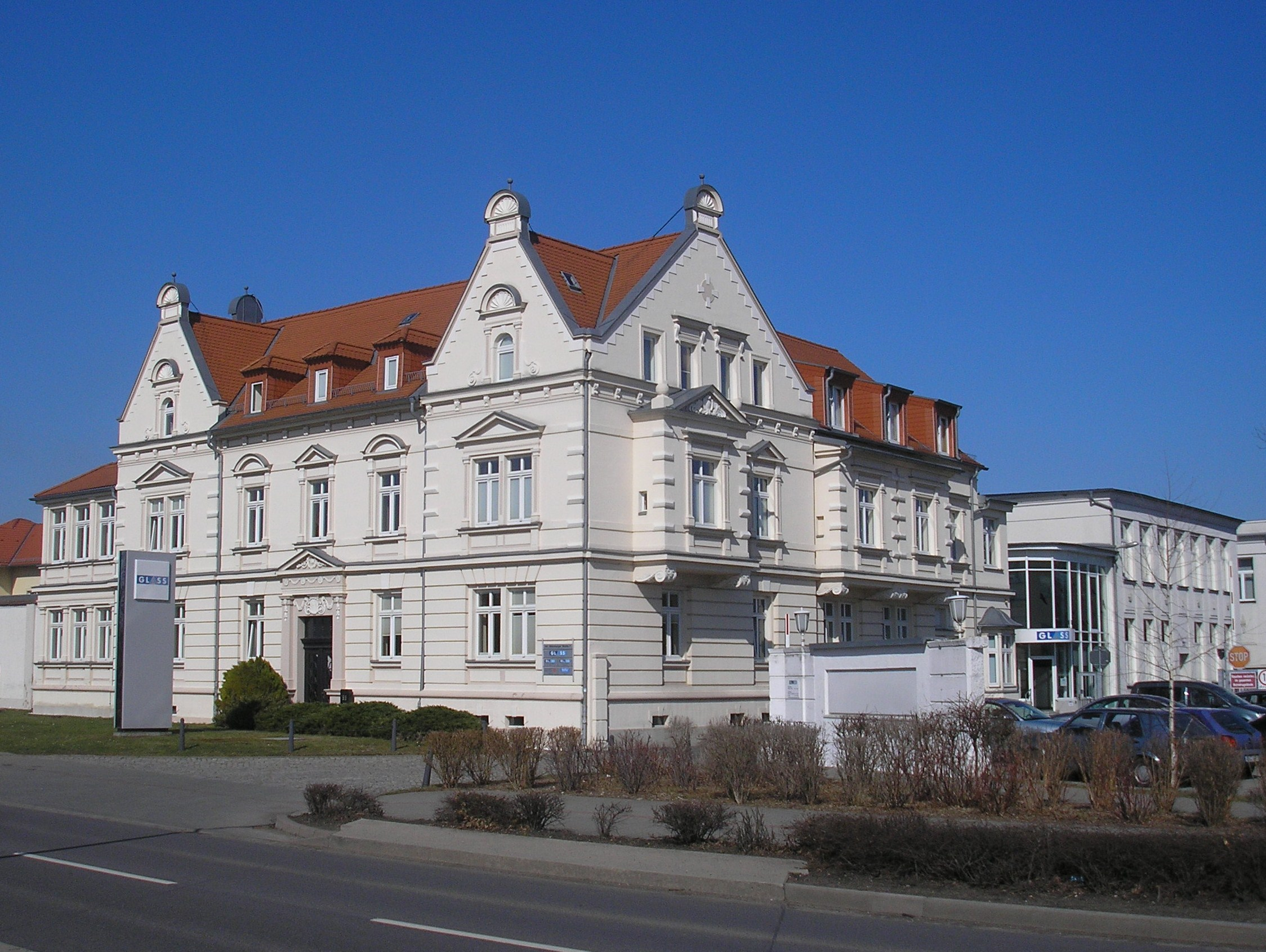 Sitz des Unternehmens Glass in Meuselwitz (Thüringen).